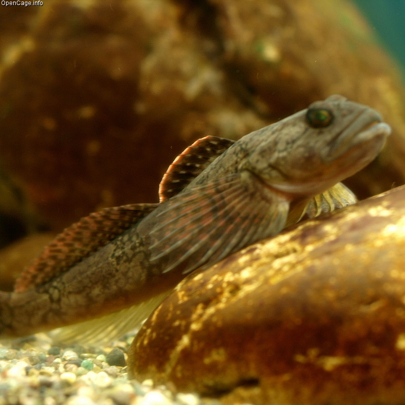 Cottus polux, escorpénido fluvial japonés